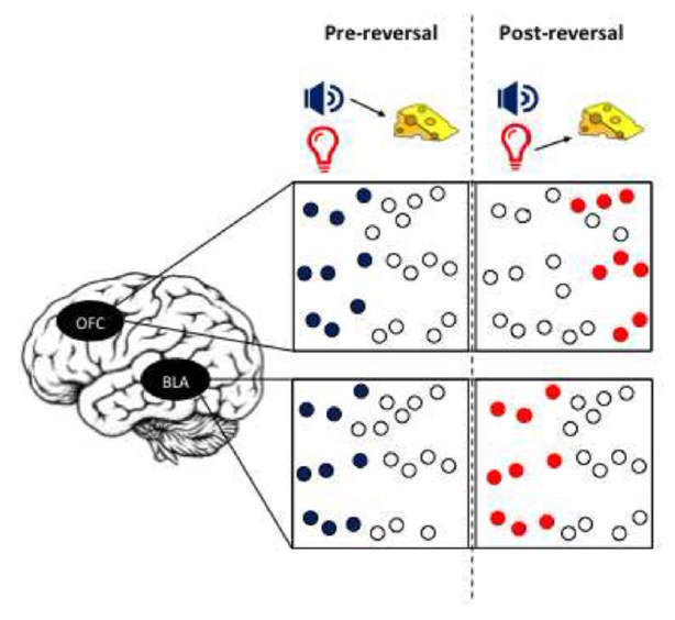 OFC BLA reversal learning